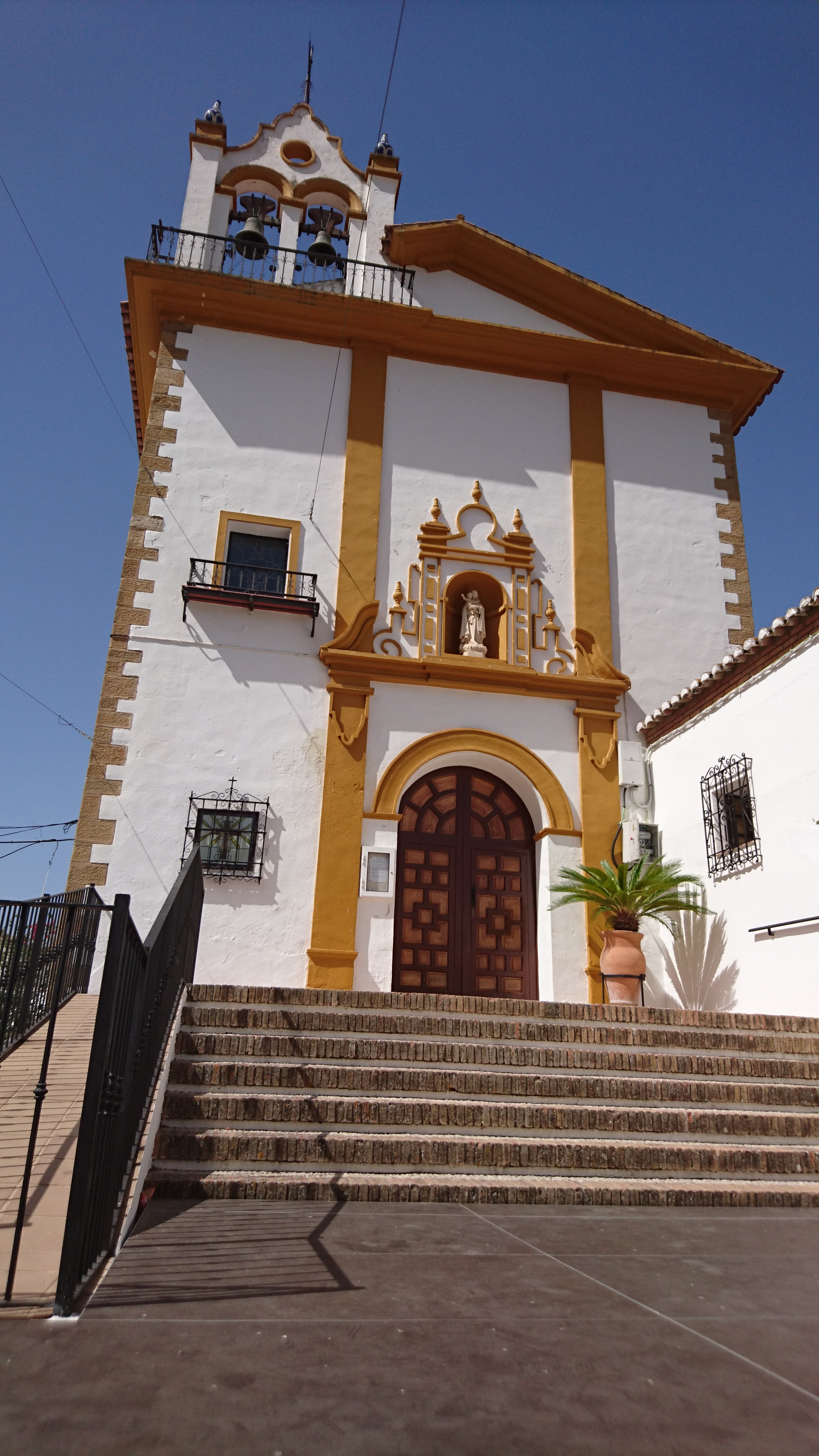 Iglesia de la Salud de Jimera de Líbar